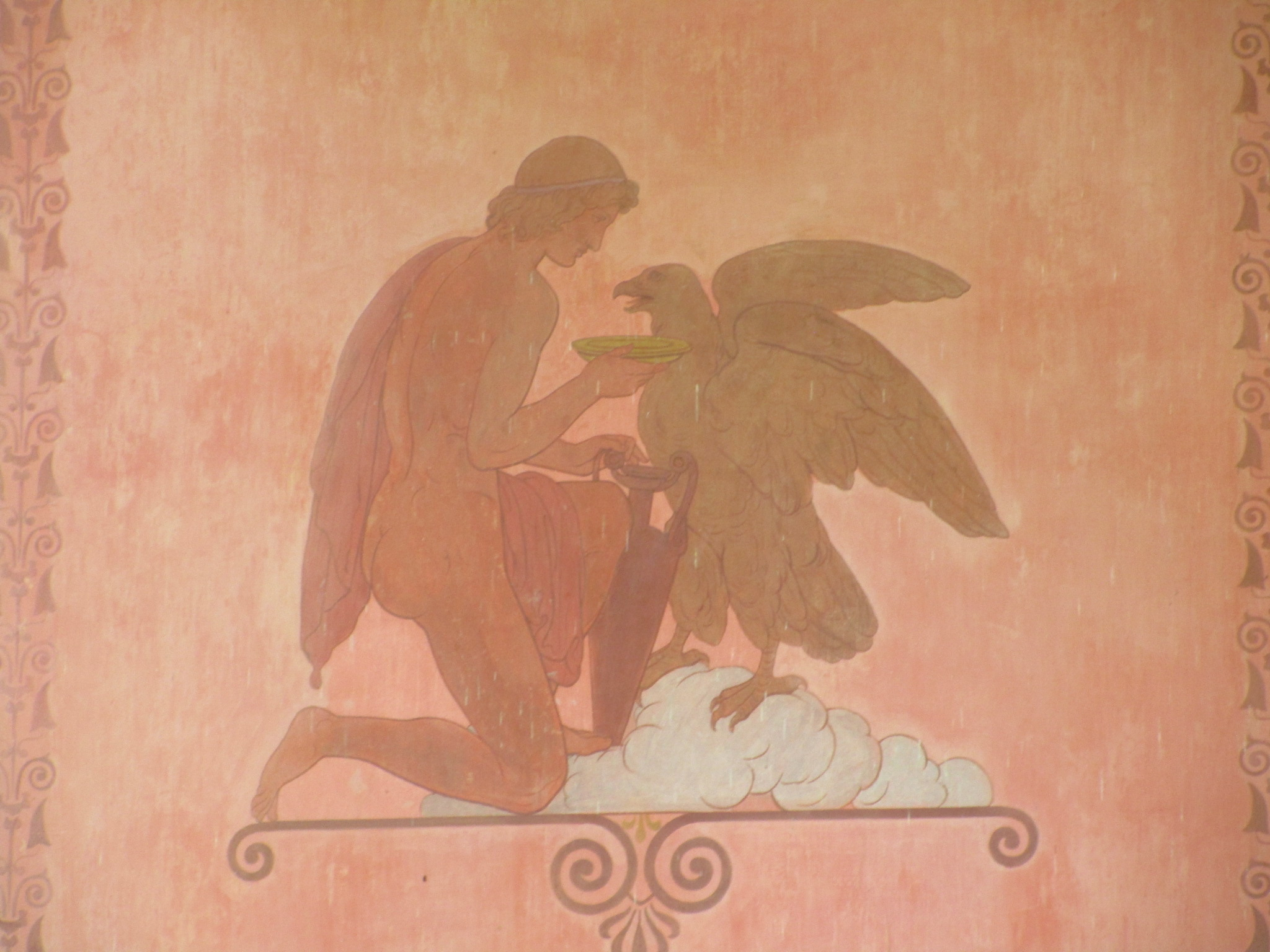 Ile aux Roses : L'aigle Zeus nourri à l'Ambrosia (nourriture divine des Dieux de la mythologie grecque qui leur assure l'imortalité )